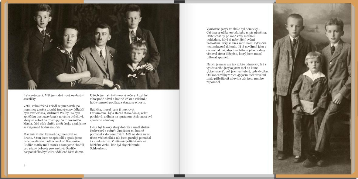 Příklad fotoknihy